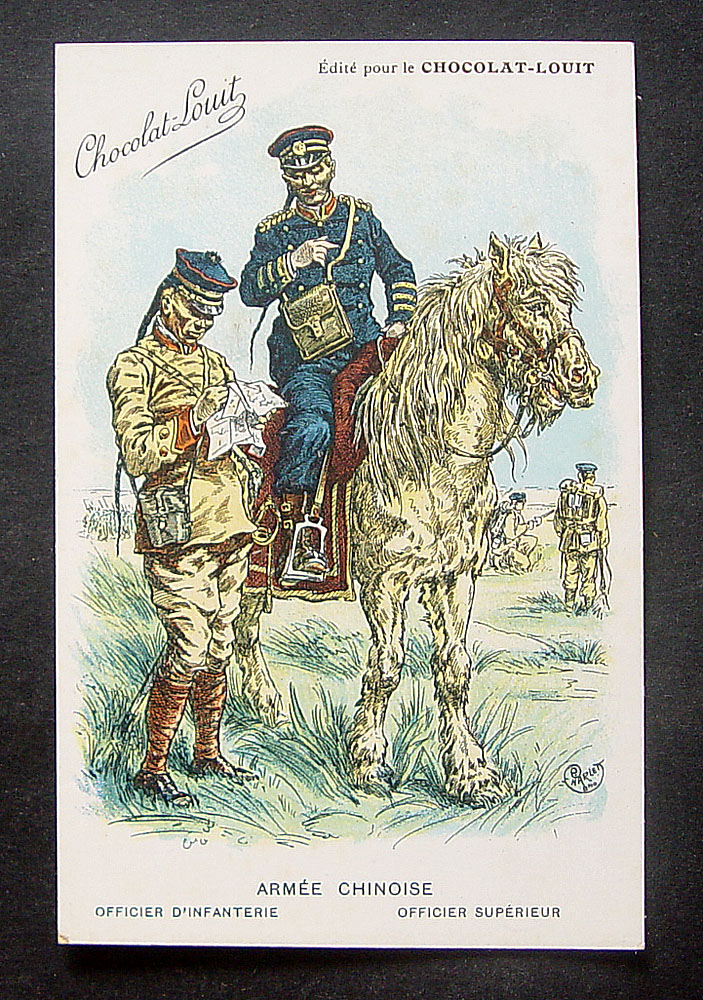 新軍の将校を描いた絵図。